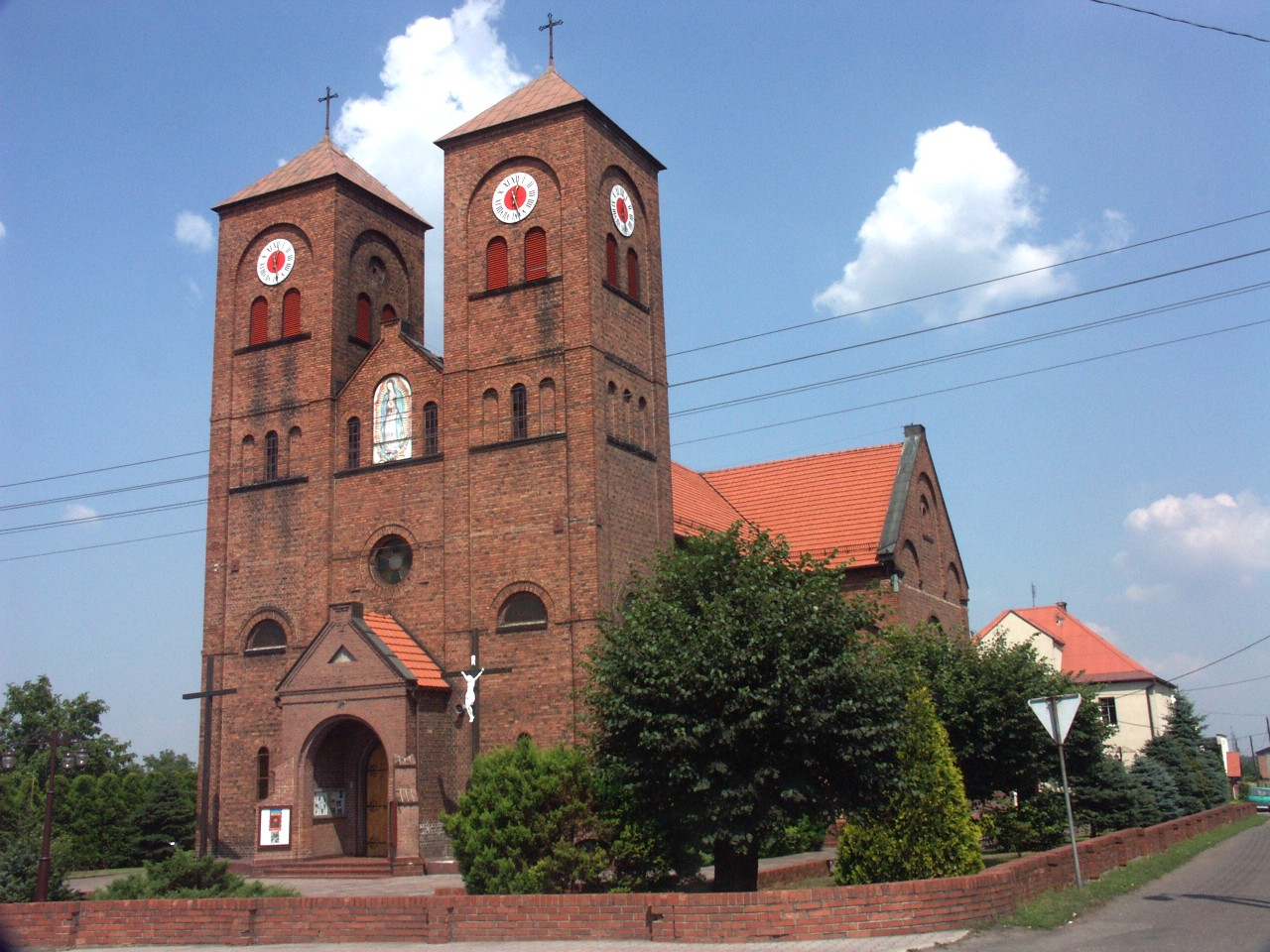 Kościół parafialny w Czuchowie.